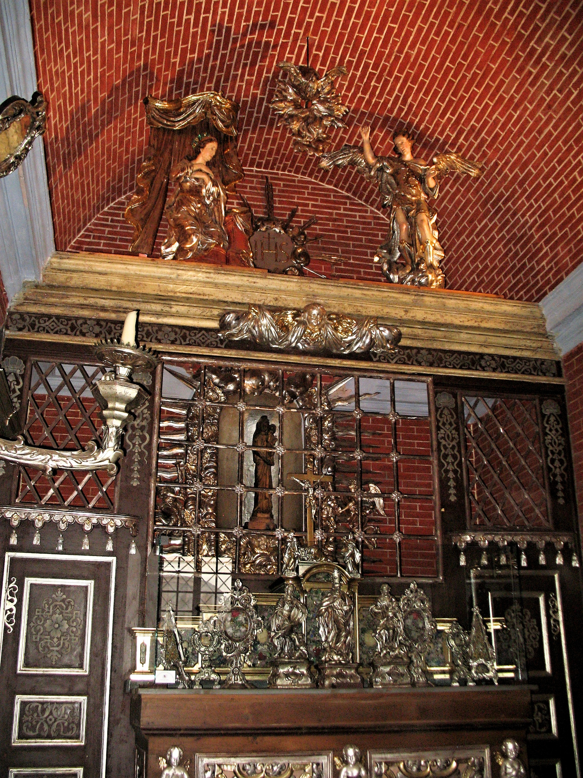 Loreta v areálu augustiniánského kláštera v České Lípě